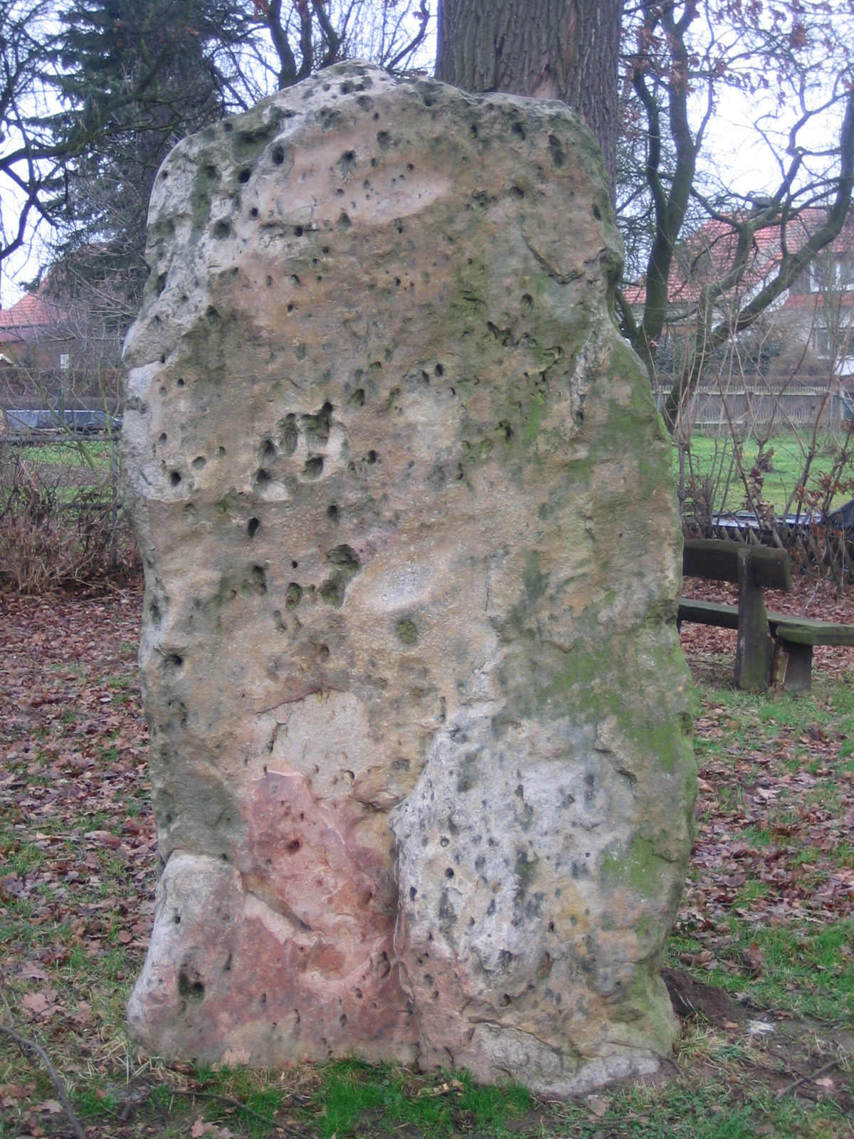 Wodanstein in Maden